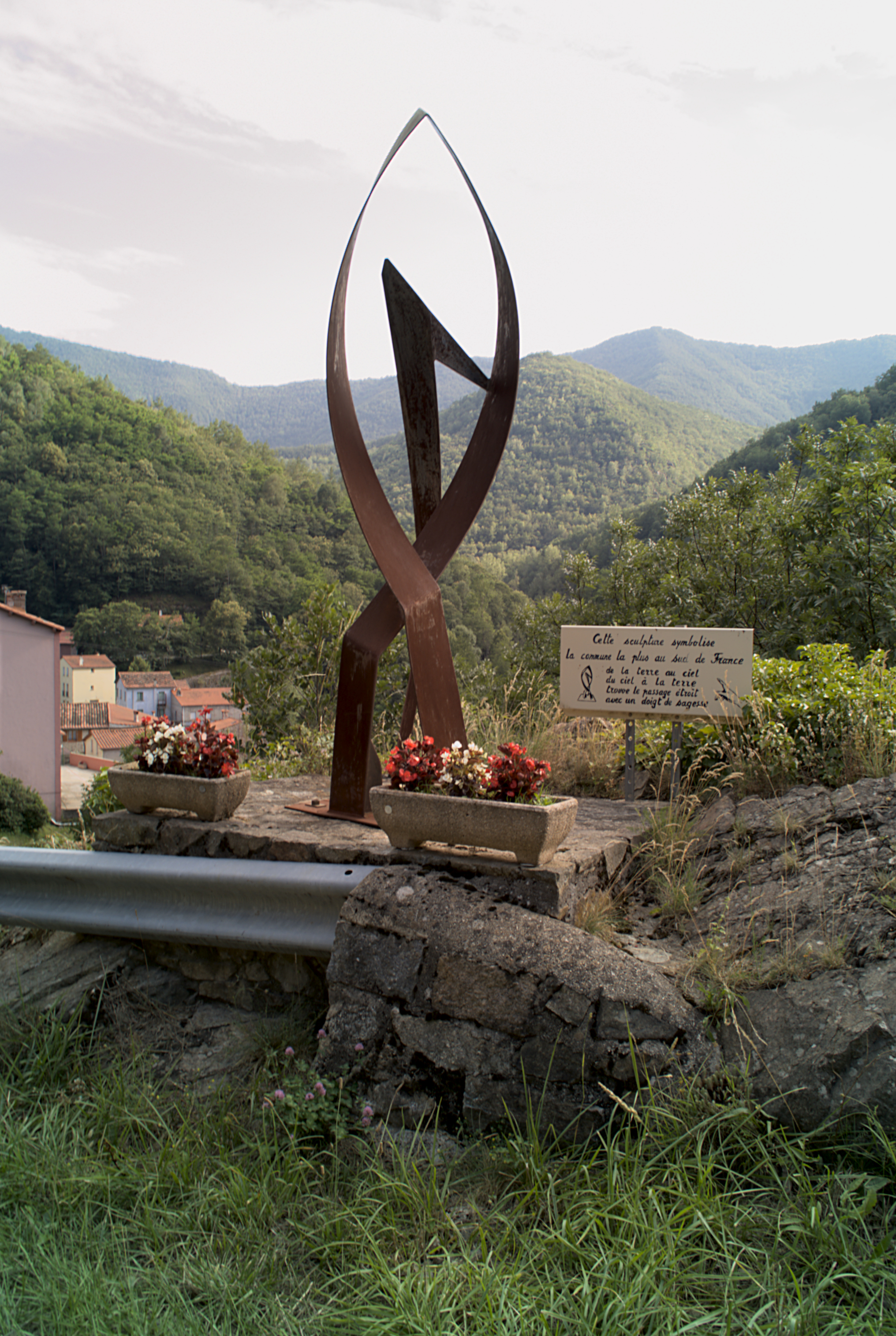 Sculpture, route départementale 44, Lamanère (Pyrénées-Orientales, Languedoc-Roussillon, France)